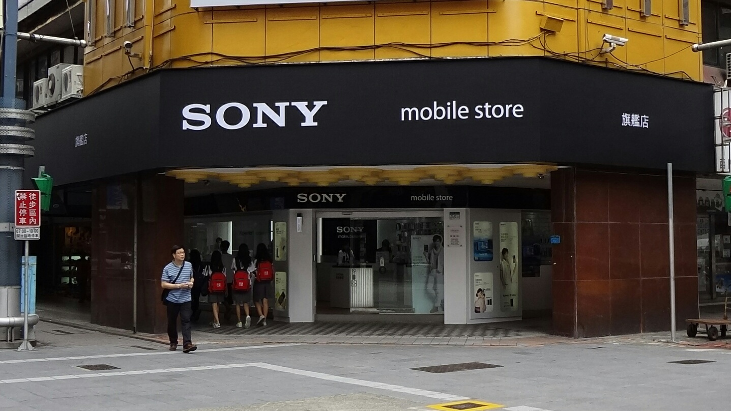 索尼移動通訊台北旗艦店，位於臺北市萬華區西寧南路36之27號1樓（獅子林新光商業大樓）。